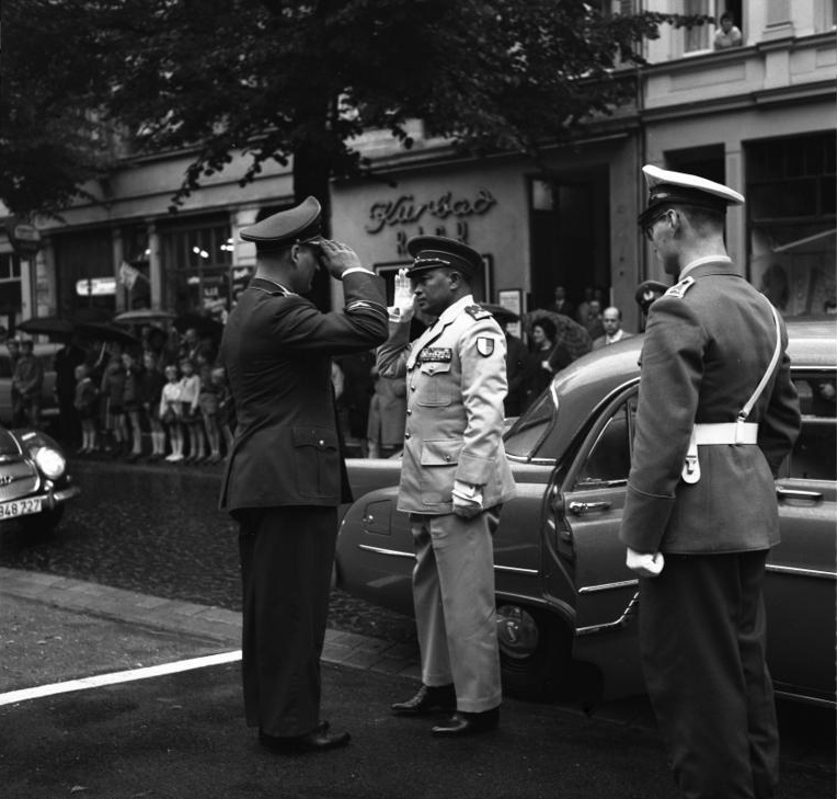 Madagaskar, Generalstabschef Ramanantsoa Empfang im Verteidigungsministerium Bonn